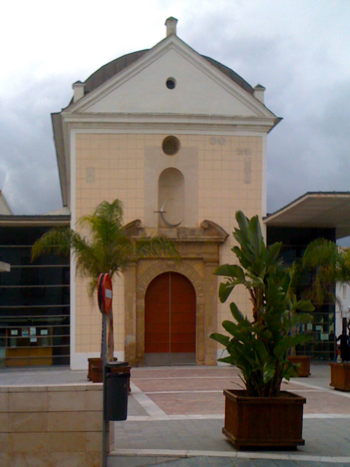 Teatro del Carmen, Vélez-Málaga, España.